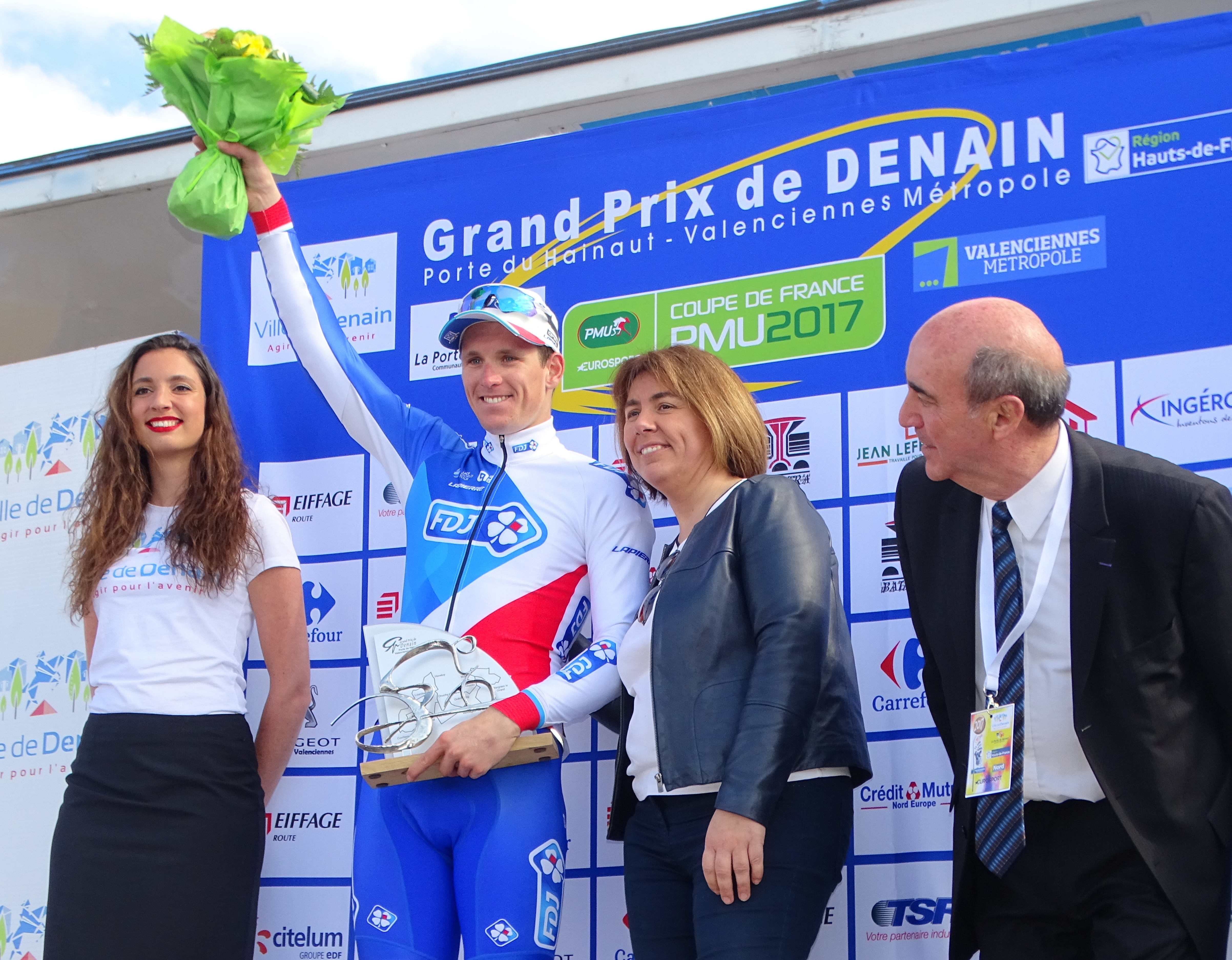 Reportage réalisé le jeudi 13 avril à l'occasion du départ et de l'arrivée du Grand Prix de Denain 2017 à Denain, Nord, Nord-Pas-de-Calais-Picardie, France.